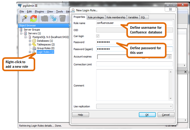 Монгол: Өгөгдлийн баз үүсгэх